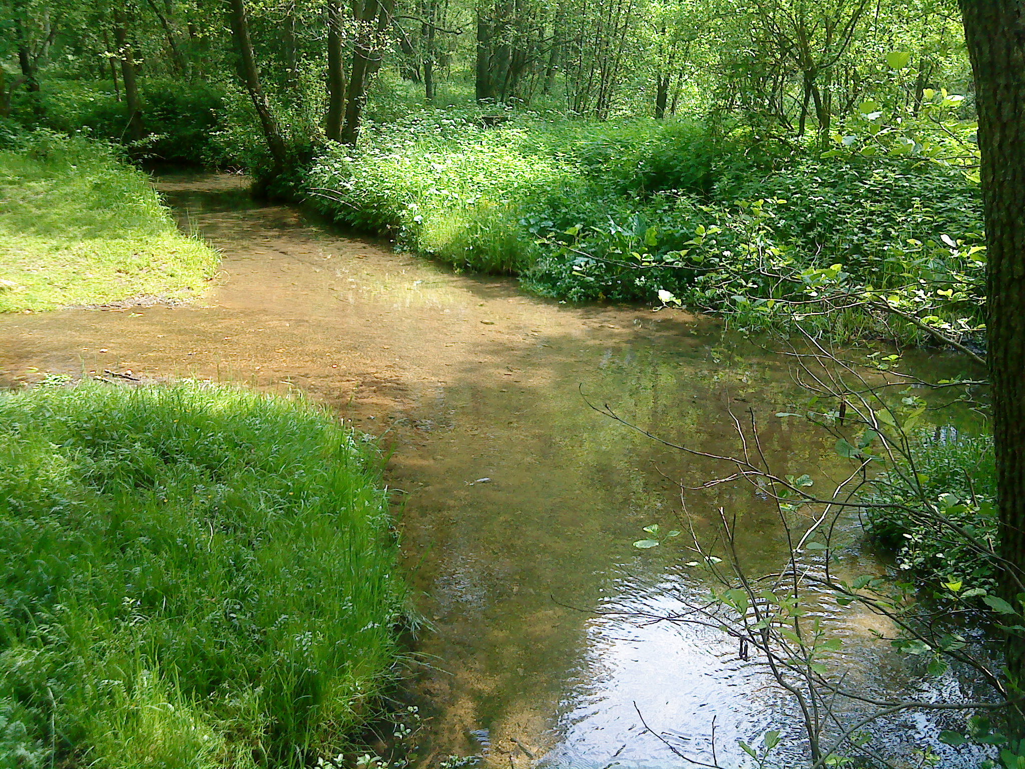 Der Breitenbrunner Bach an den Sieben Quellen